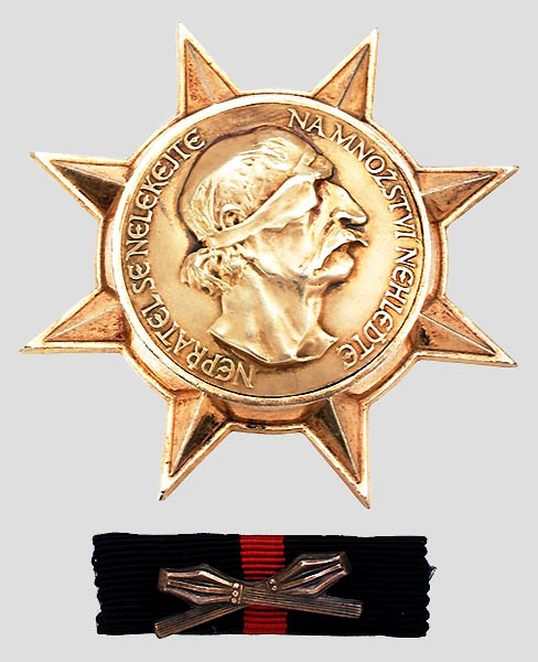 Орден Яна Жижки 1 степени (ЧССР)